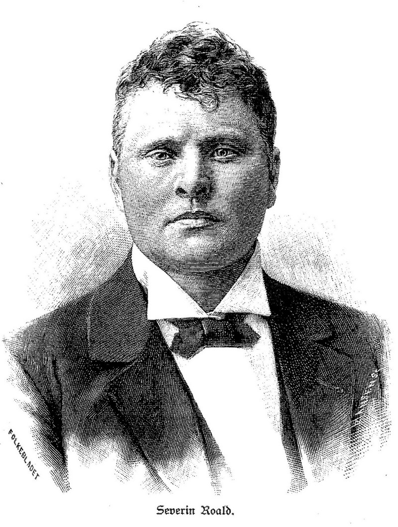 Portrett frå nn_Folkebladet 1898